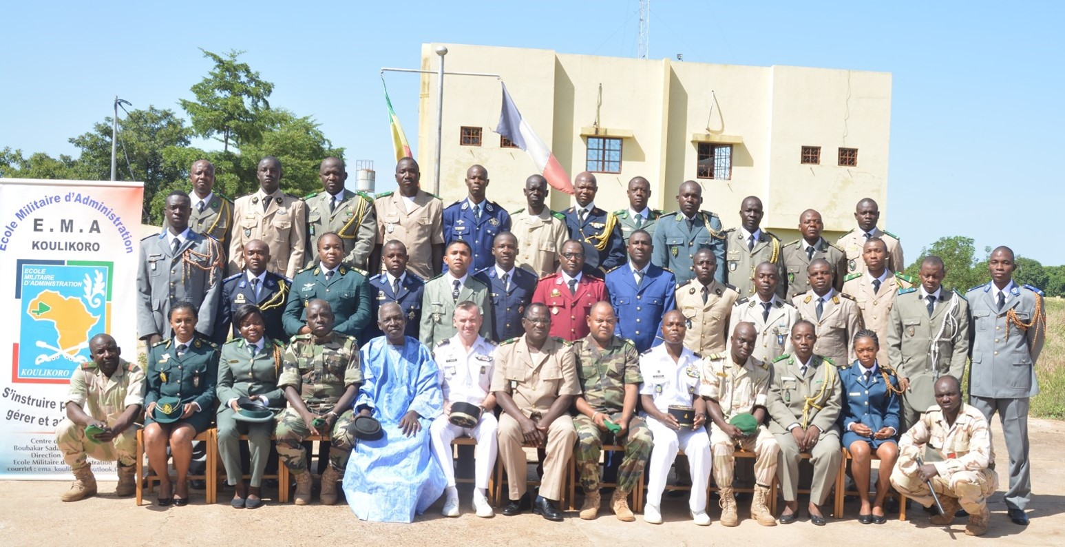 19ème Promotion Officier d'administration Koulikoro